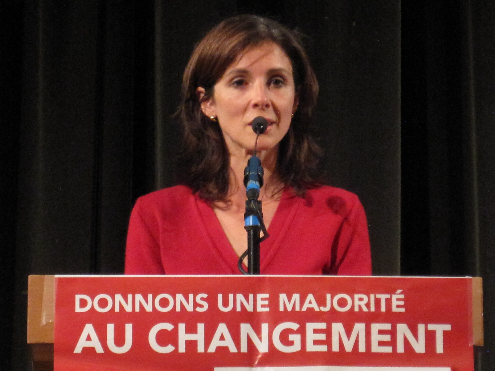 Barbara Romagnan - Législatives Doubs 2012